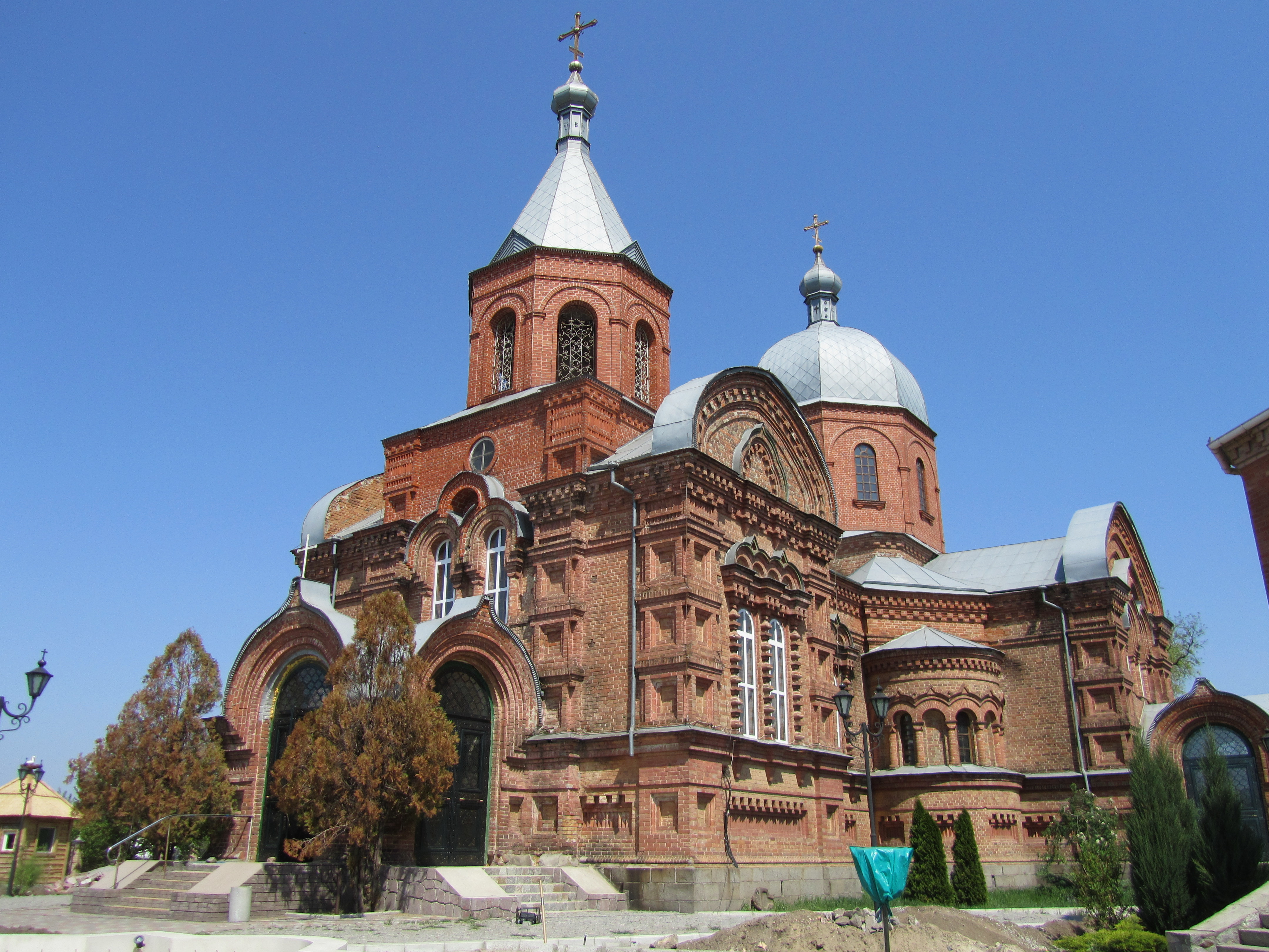 Храм у Кам'яних Потоках